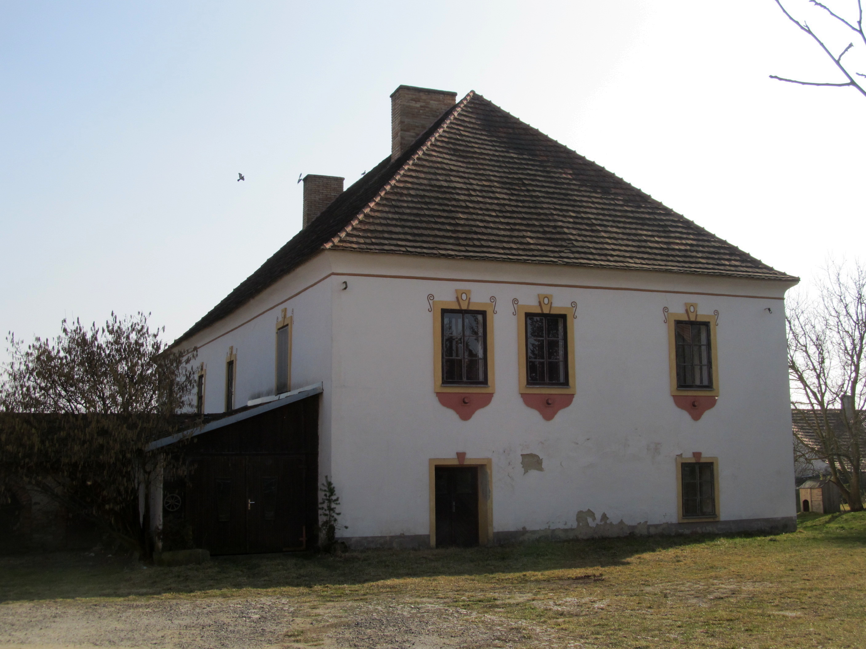 Radomyšl - děkanství